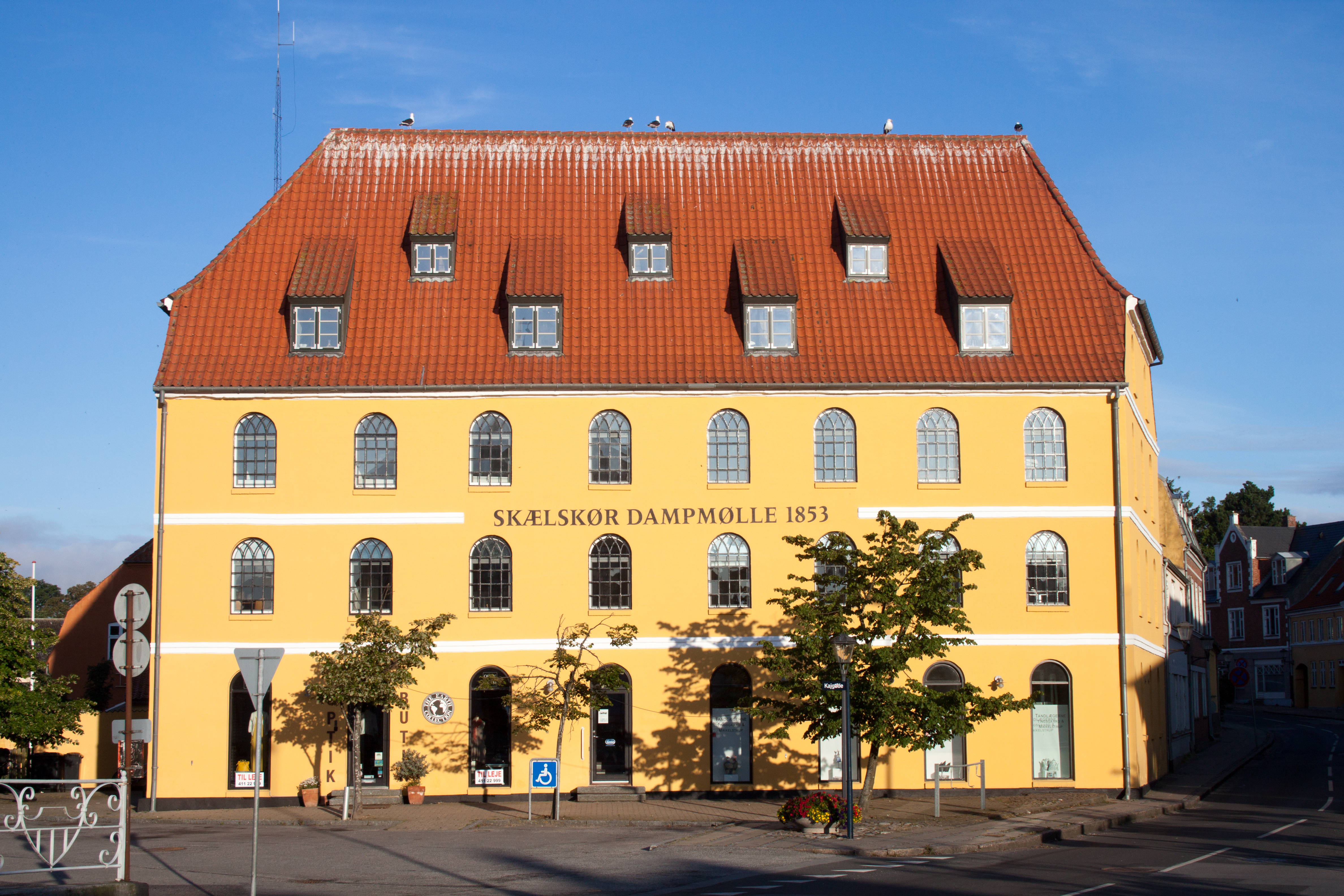 Steam milllabel QS:Len,"Steam mill" label QS:Lhu,"Egykori gózmalom"